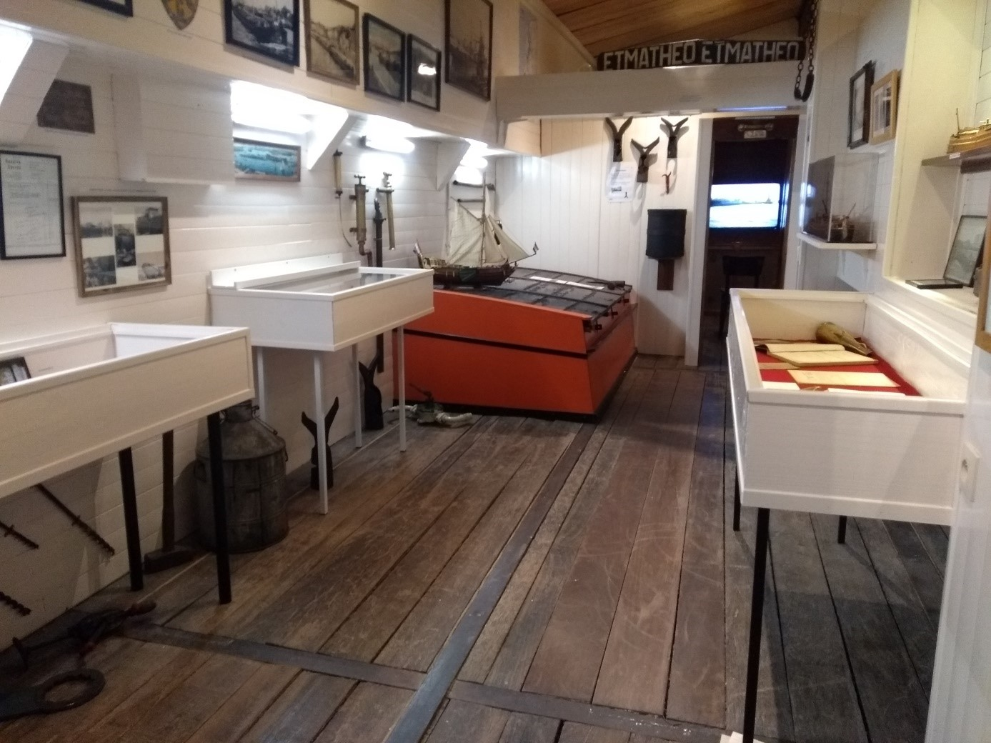 Museumschip Tordino als museum in Beernem in 2018